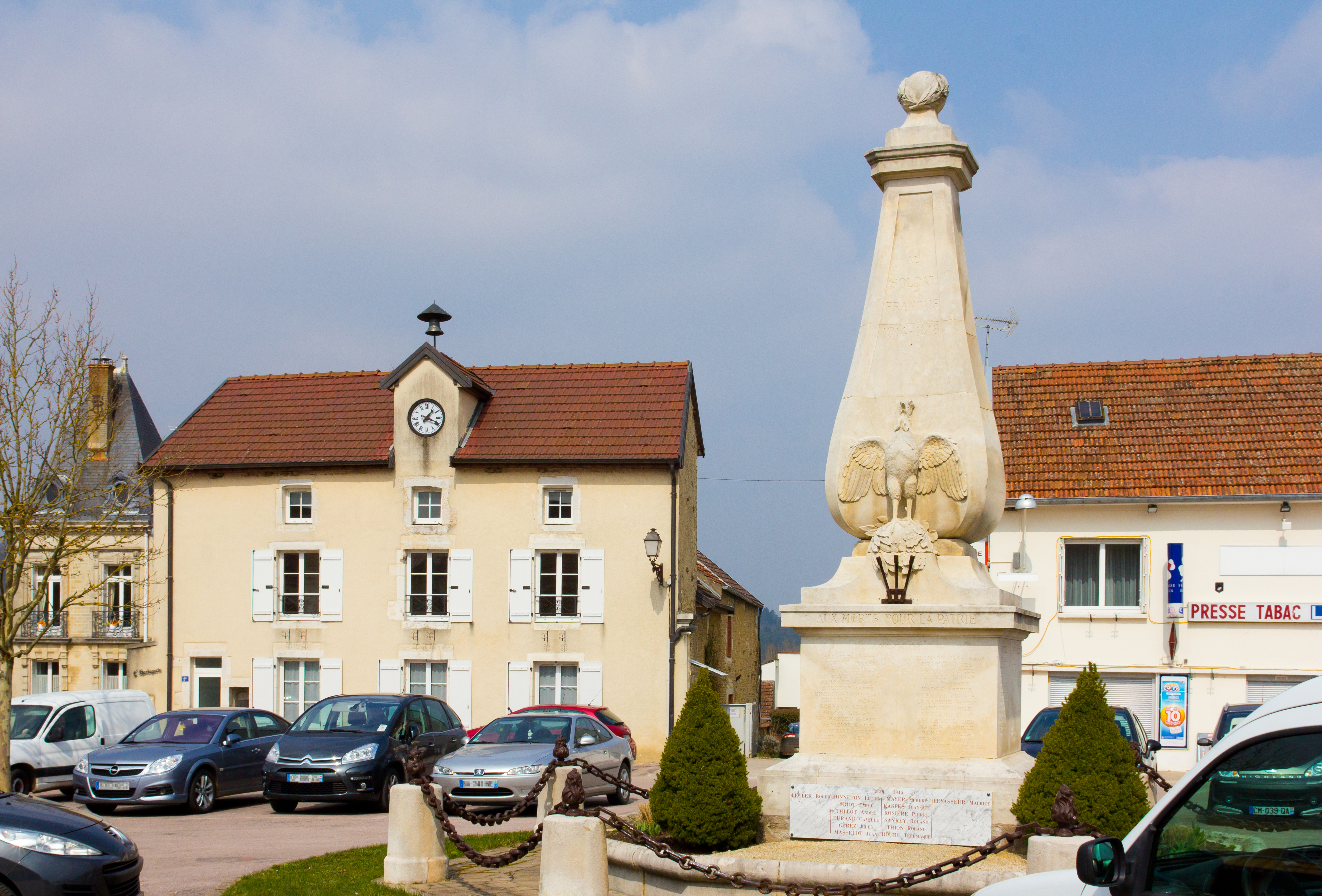 Andelot-Blancheville, Haute-Marne, Dorfplatz mit Kriegerdenkmal